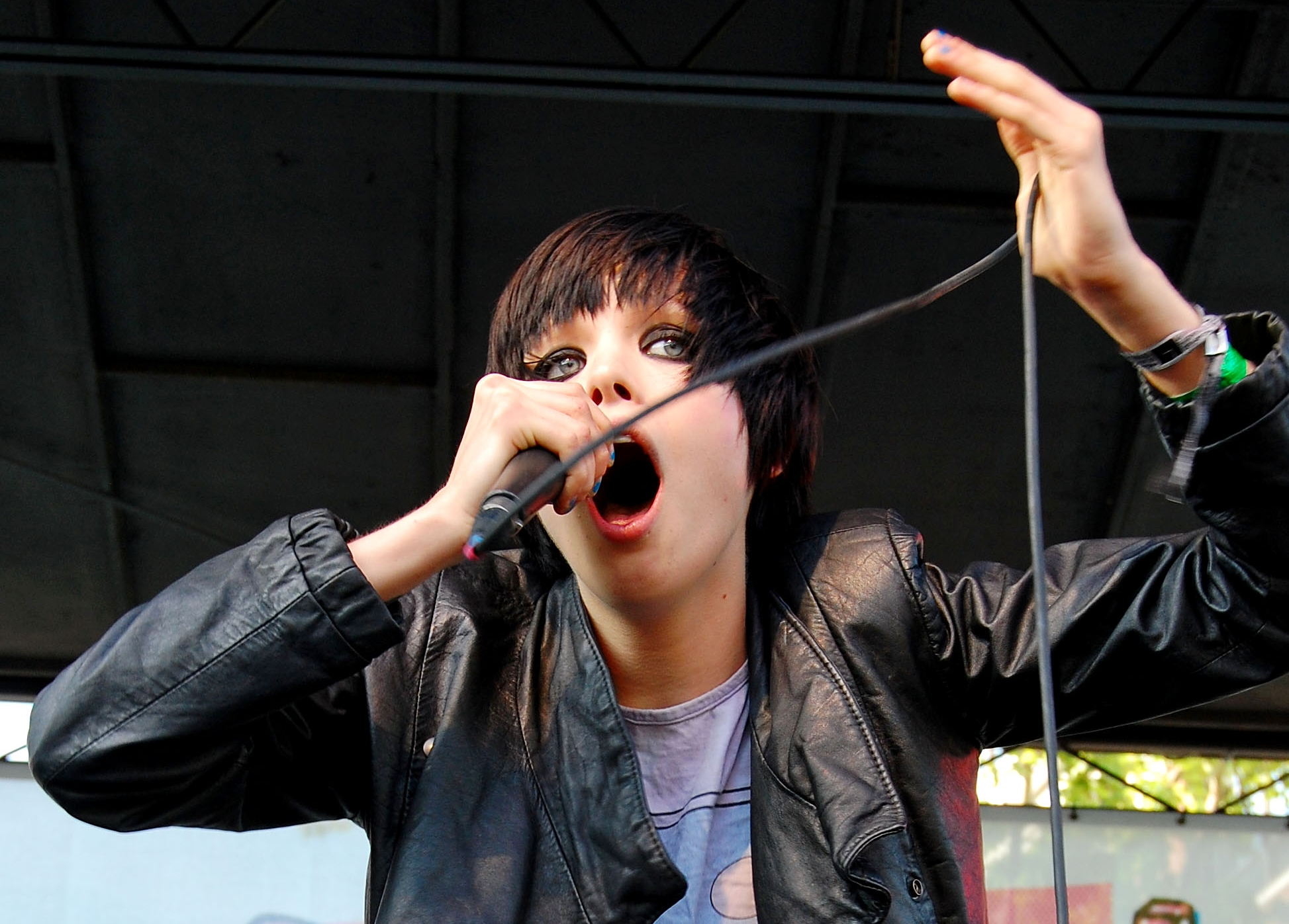 Alice Glass, vocalista de Crystal Castles.